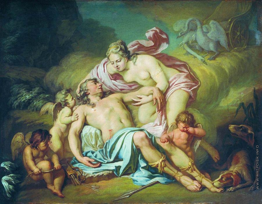 Adonis and ??label QS:Lru,"Смерть Адониса Год создания Материал Размер Собрание" label QS:Len,"Adonis and ??"